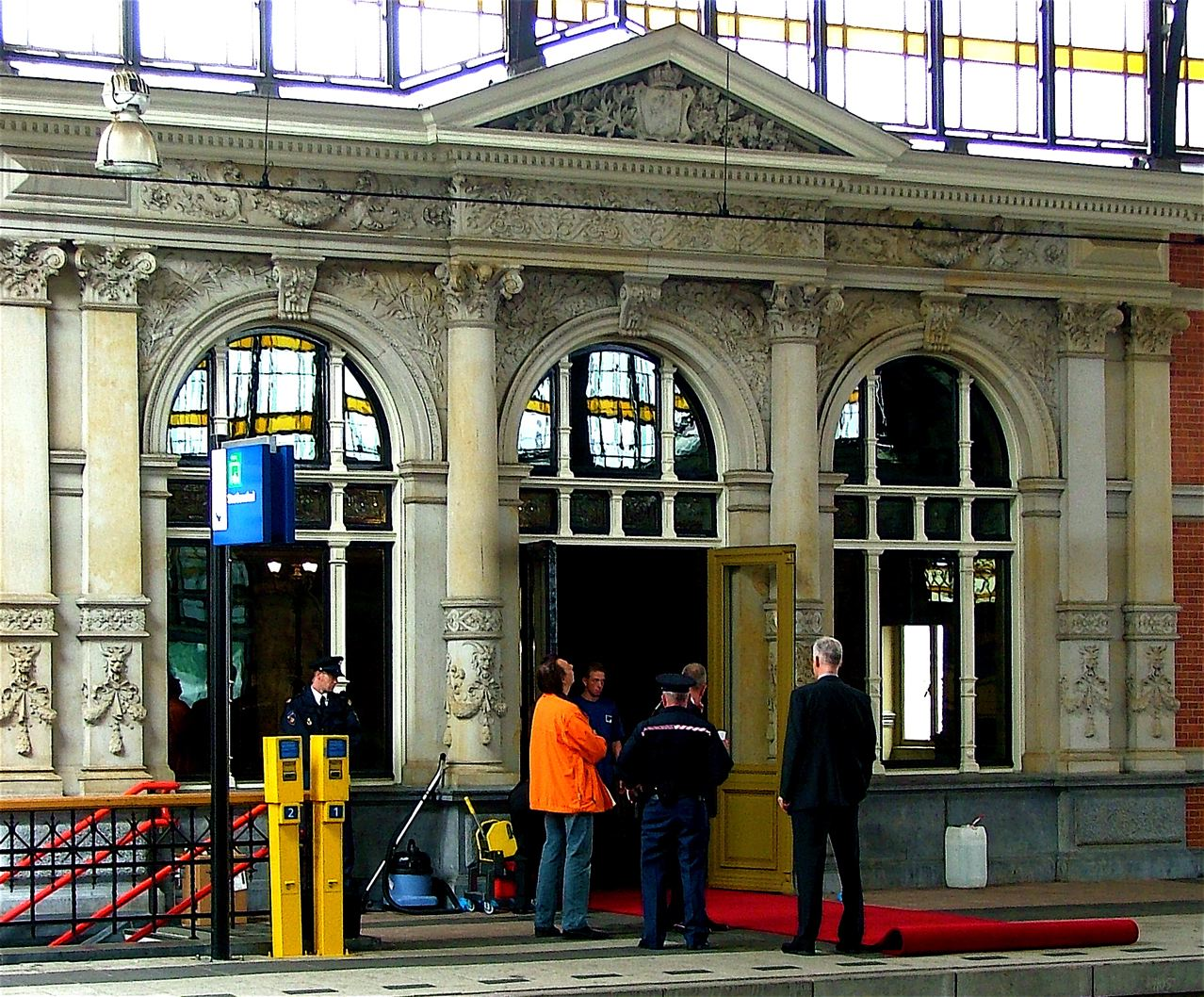 Later bleek opening Betuwe lijn